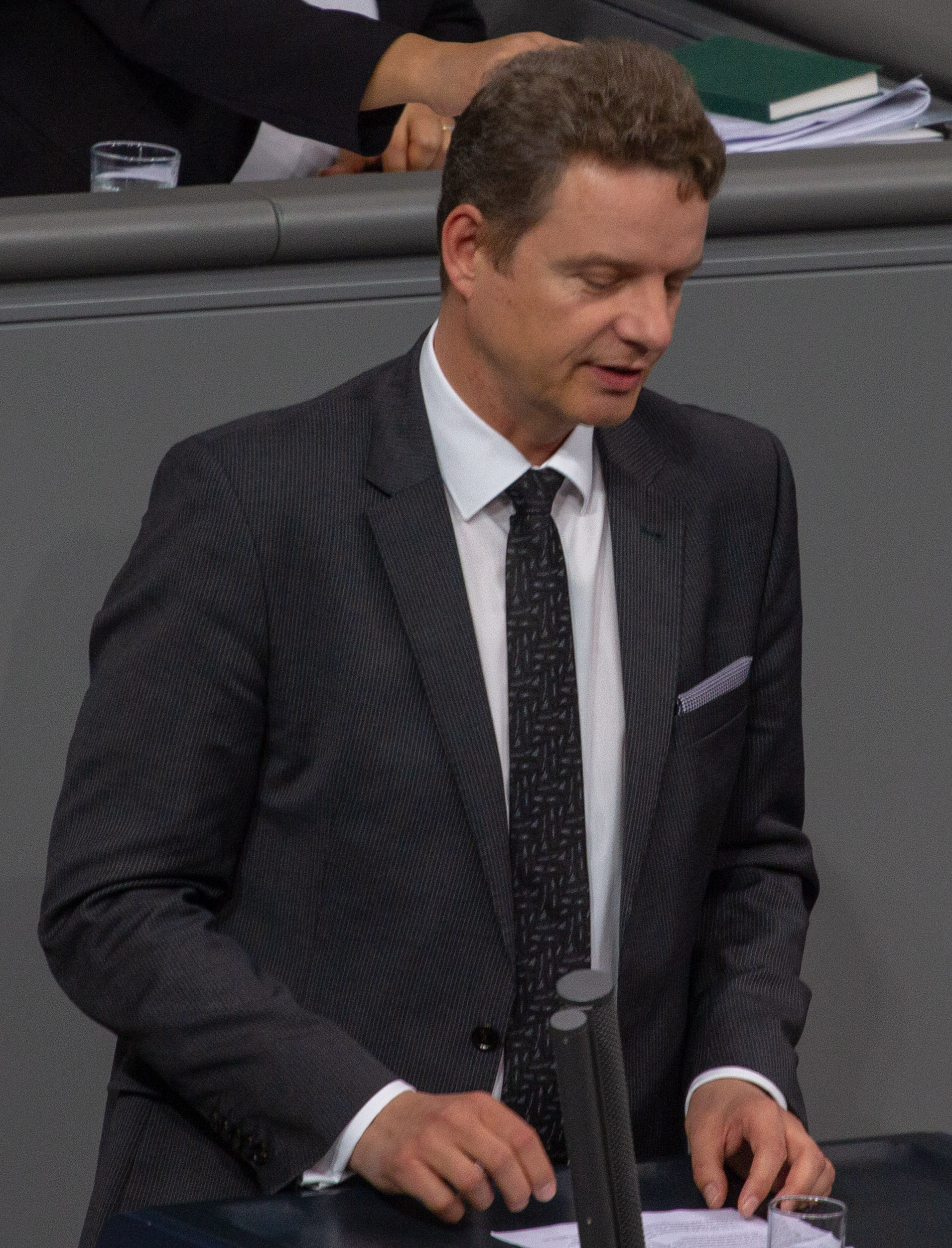 Jens Beeck, Mitglied des Deutschen Bundestages, während einer Plenarsitzung am 11. April 2019 in Berlin.